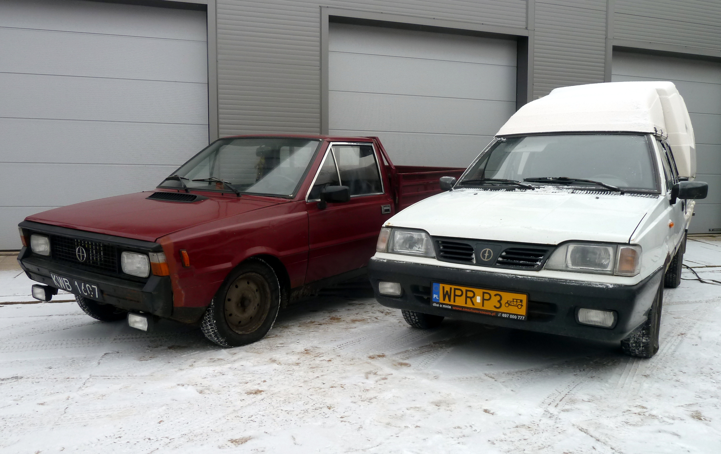 Dwa samochody FSO Polonez Truck (I generacja) oraz Daewoo-FSO Polonez Truck Plus (III i ostatnia generacja) ze zbiorów Muzeum Motoryzacji i Techniki w Opaczy Kolonii